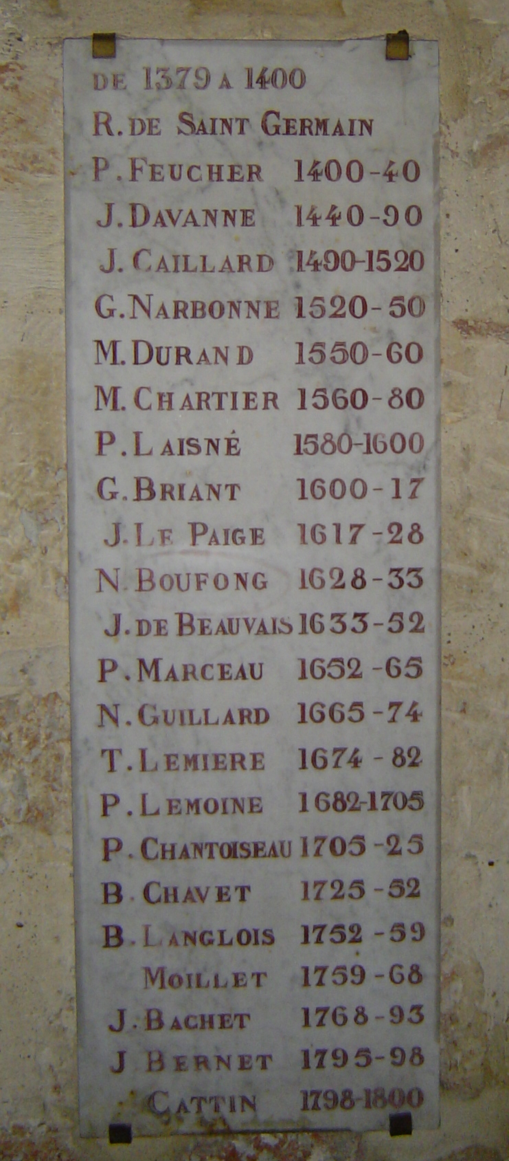 Antony - Liste des curés (1/2)